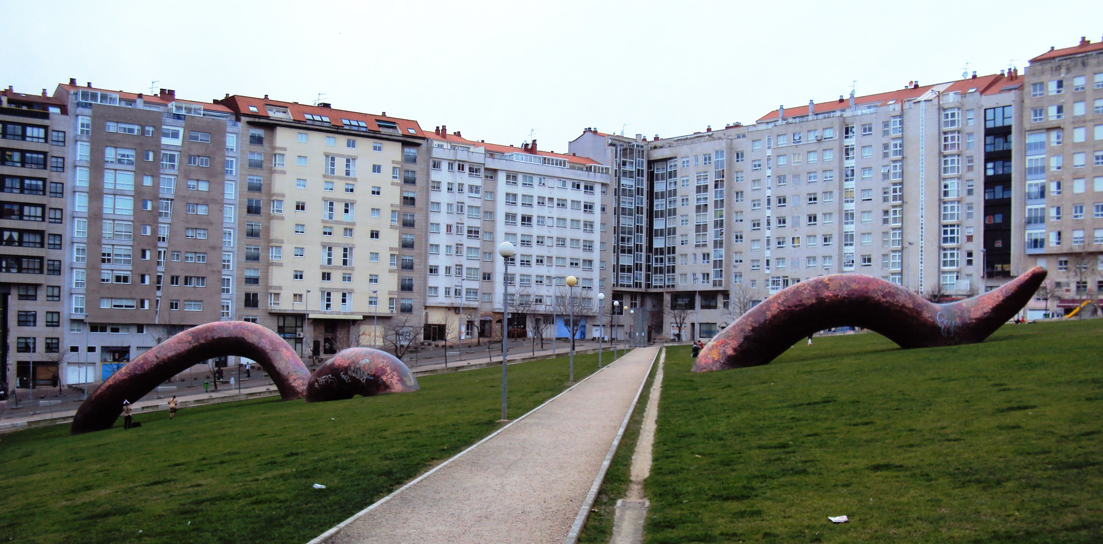 Praza da Miñoca, Vigo